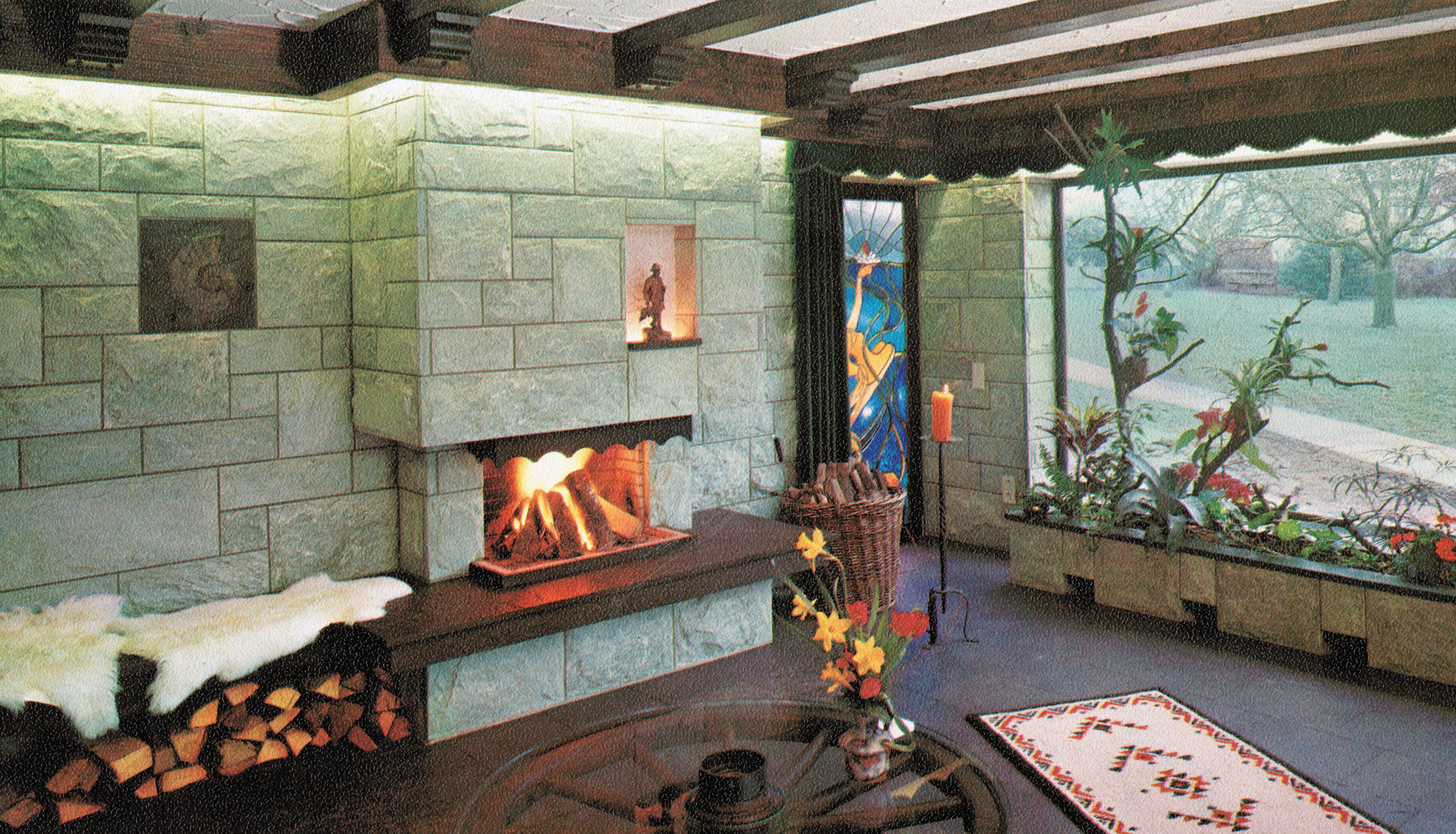 Innengestaltung Wohnzimmer mit dem grünen St. Niklauser Quarzit aus dem Nikolaital